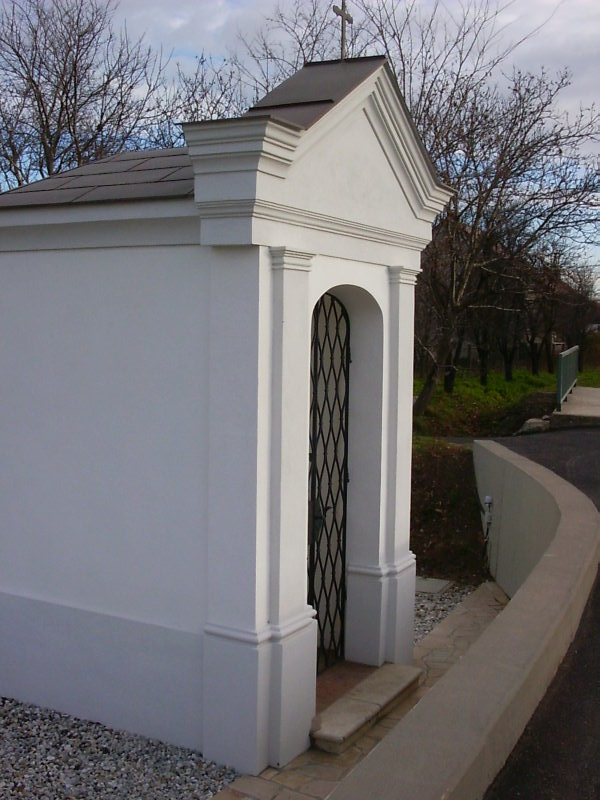 Kápolna a 82-es út mellett (Écs, Magyarország)